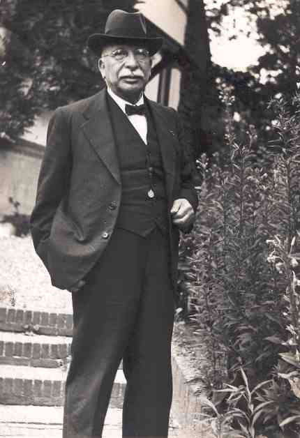 Jac. P. Thijsse Bild freigegeben durch die Heimans en Thijsse Stichting (Stiftung) Für Wikipedia